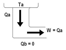 Qa é convertido completamente em trabalho (W),Gustinho Rossi.